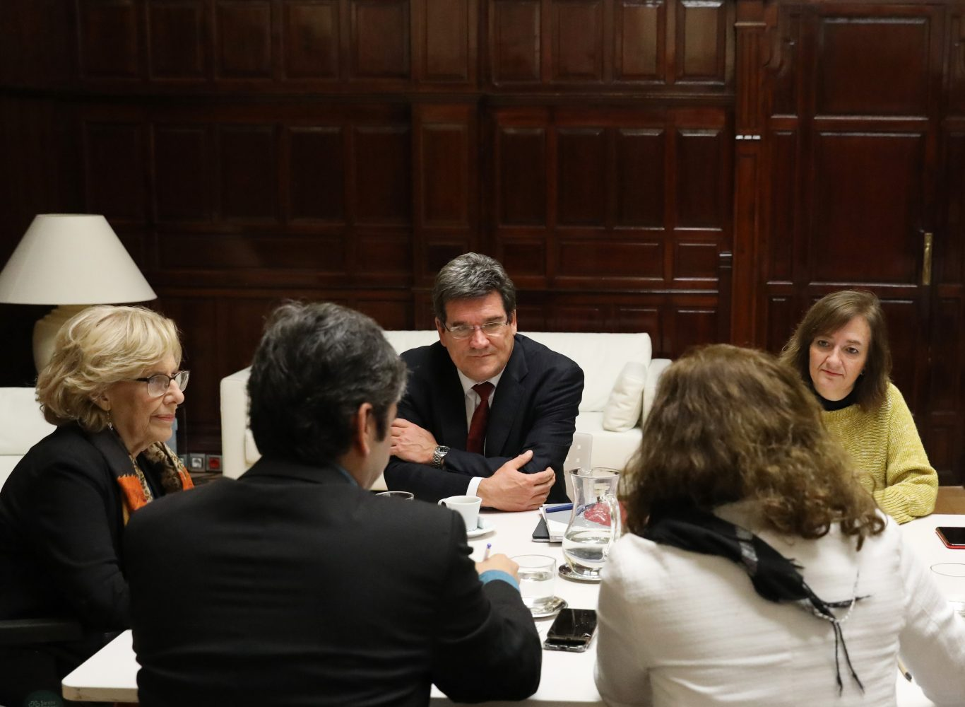 La alcaldesa ha mantenido una reunión de trabajo con el presidente de la AIREF Junto al delegado de Economía y Hacienda y la interventora general del Ayuntamiento 01/02/2019 La alcaldesa de Madrid, Manuela Carmena, ha mantenido hoy, viernes, una reunión de trabajo con José Luis Escrivá, presidente de la Autoridad Independiente de Responsabilidad Fiscal (AIREF), en su despacho del palacio de Cibeles.